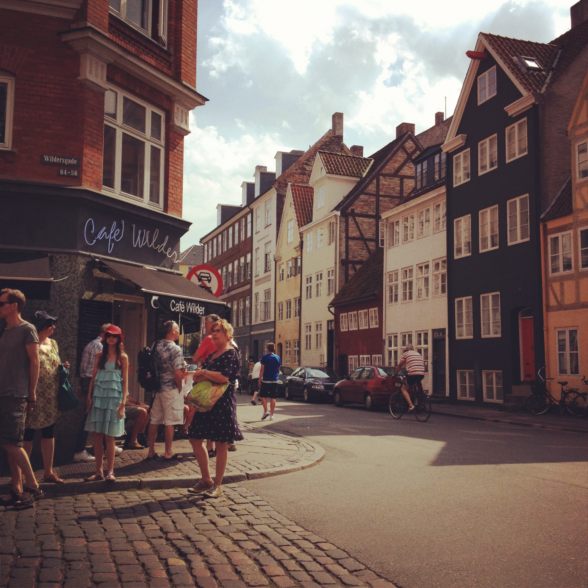 Sankt Annæ Gade 12